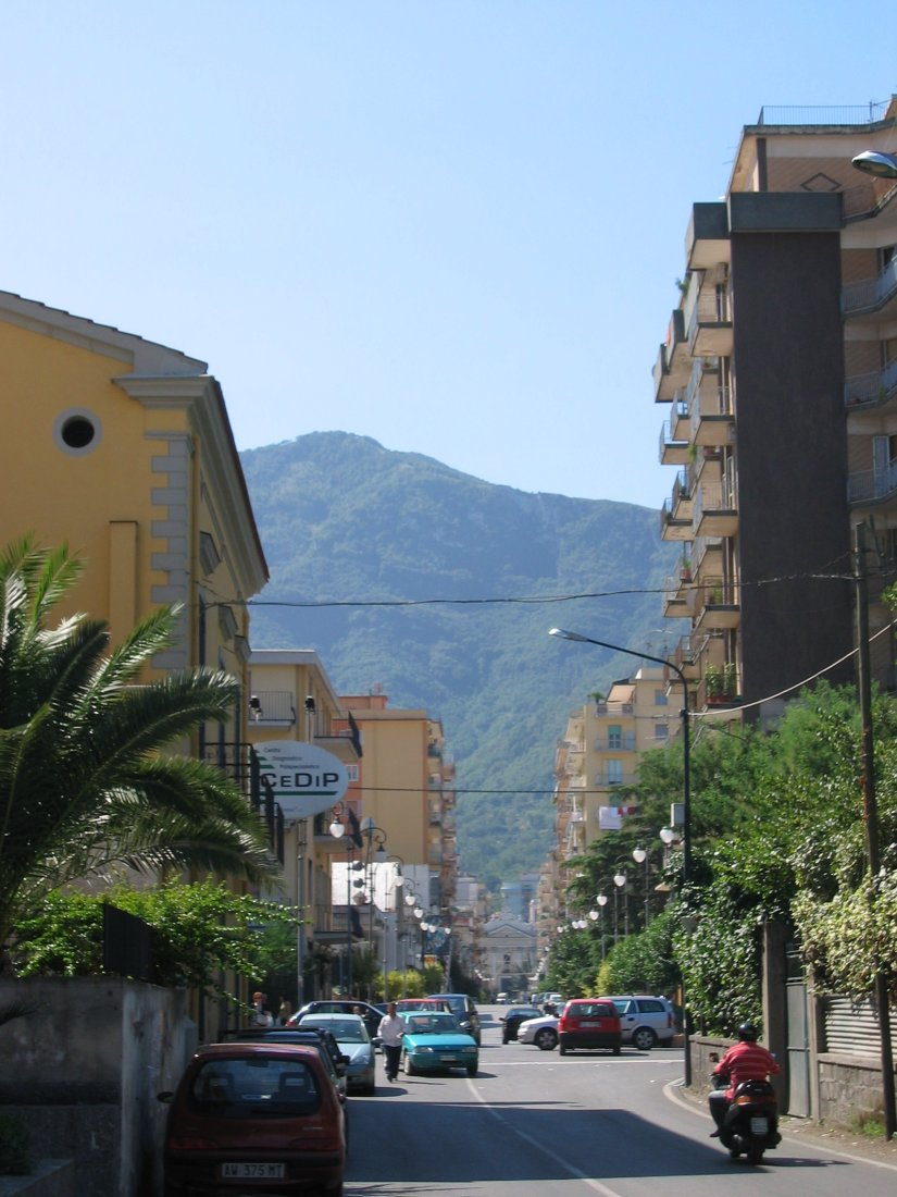 Góry otaczające miasto Pagani (Włochy)